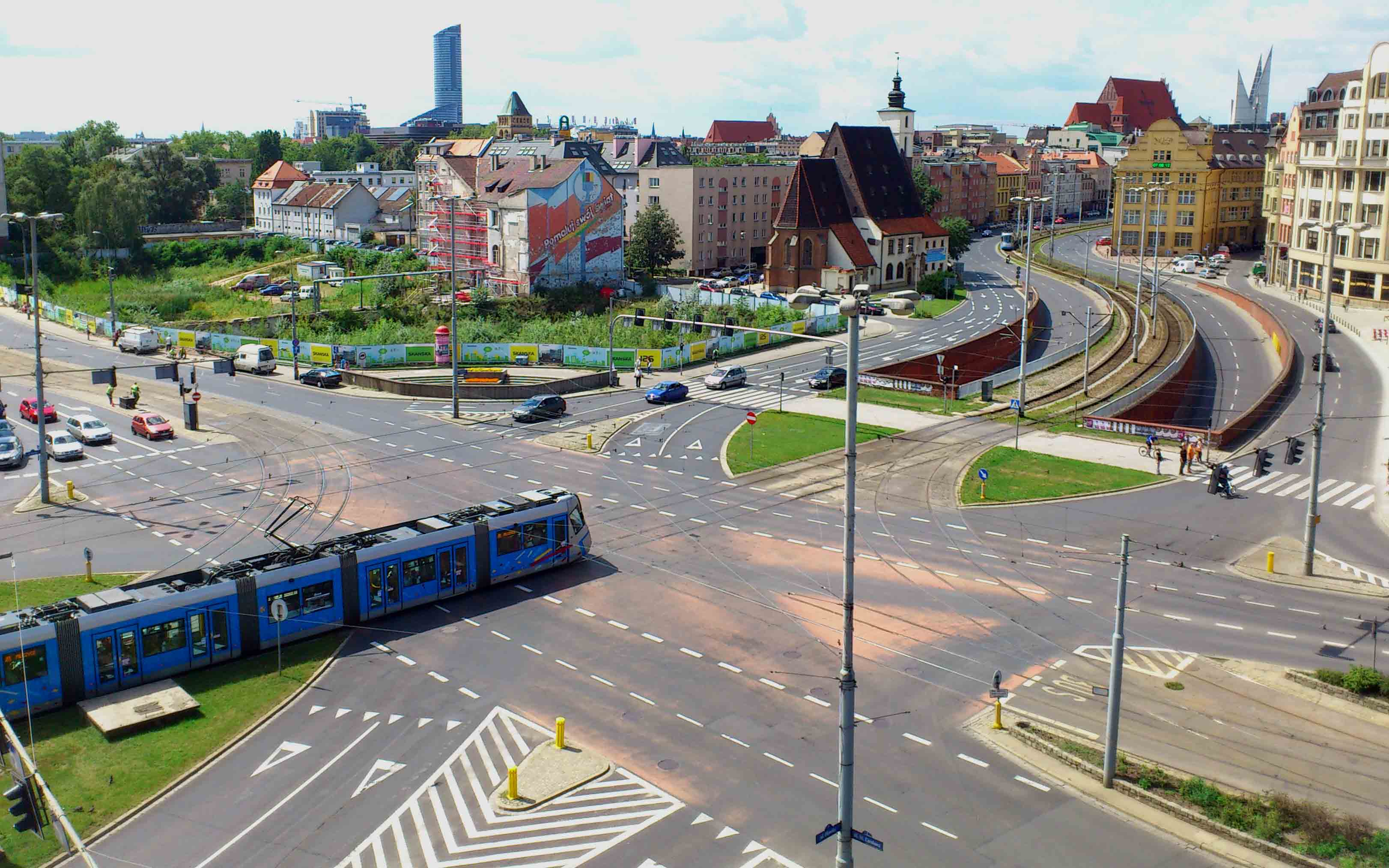 Plac Dominikański we Wrocławiu